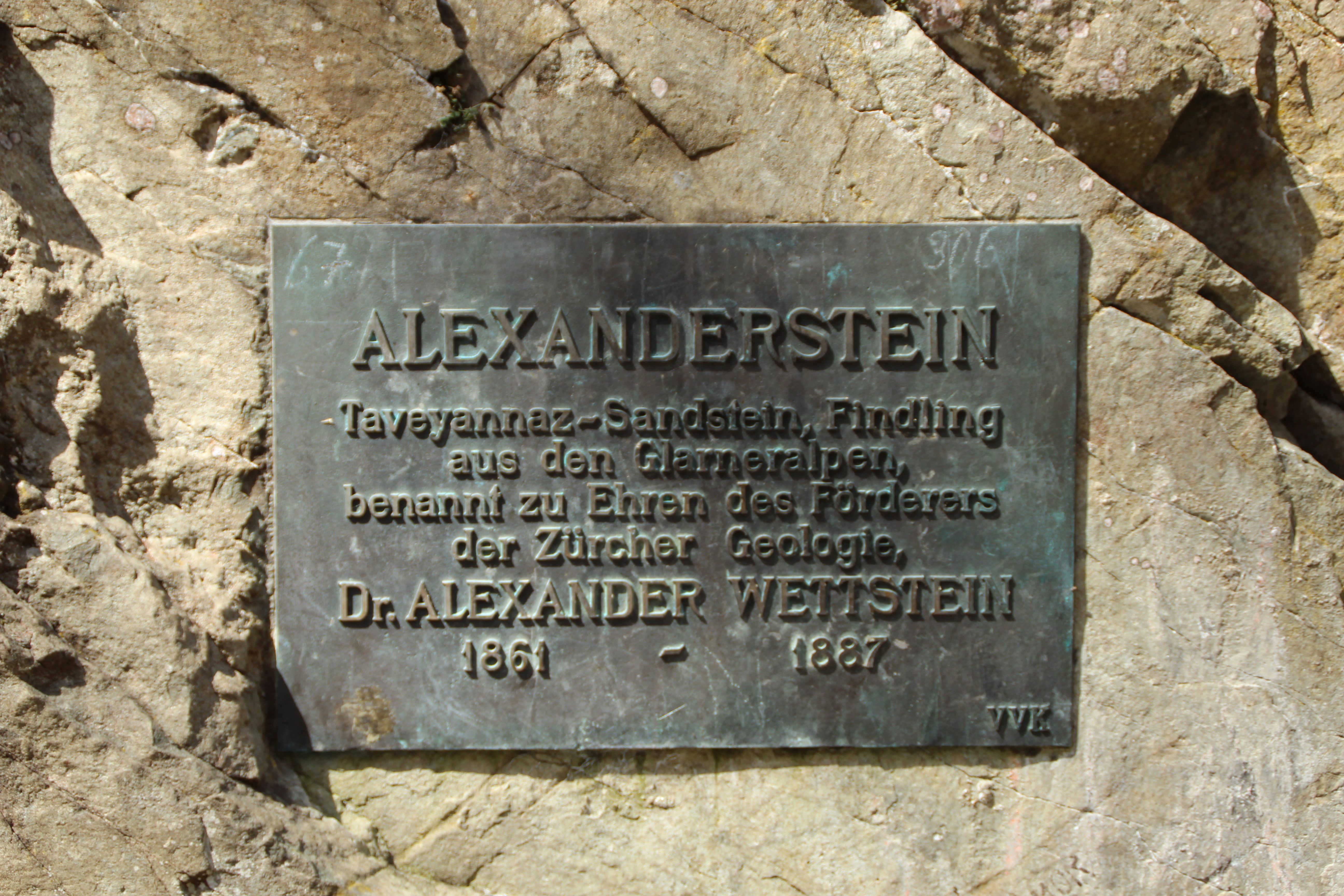 Küsnachter Dorfbach Alexanderstein